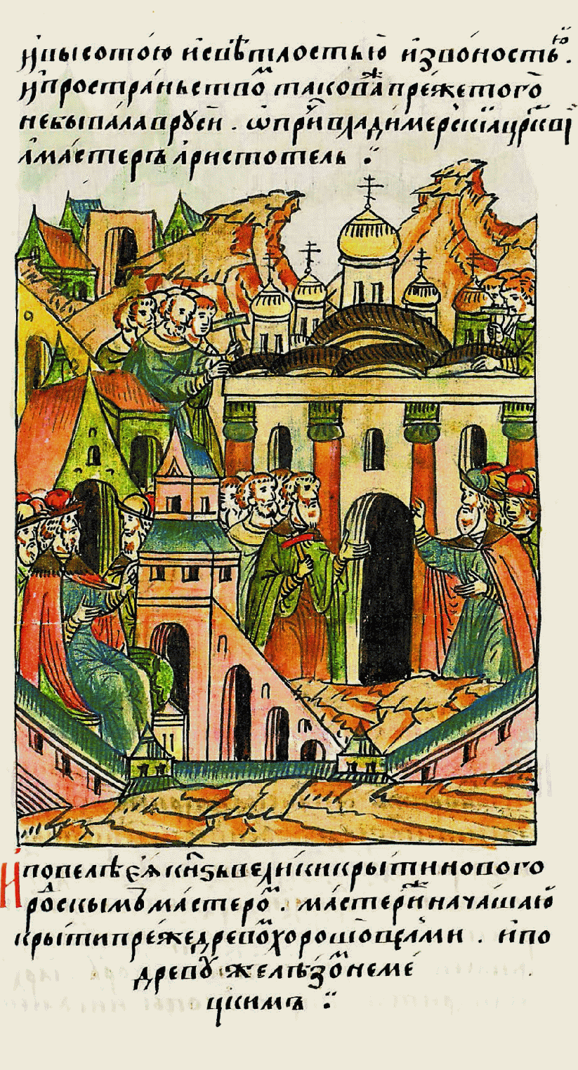 и высотой, и светло- стью, и звонностью, и пространством, такой же прежде того не бывало на Руси, кроме Владимирской церкви; а мастер — Аристотель.